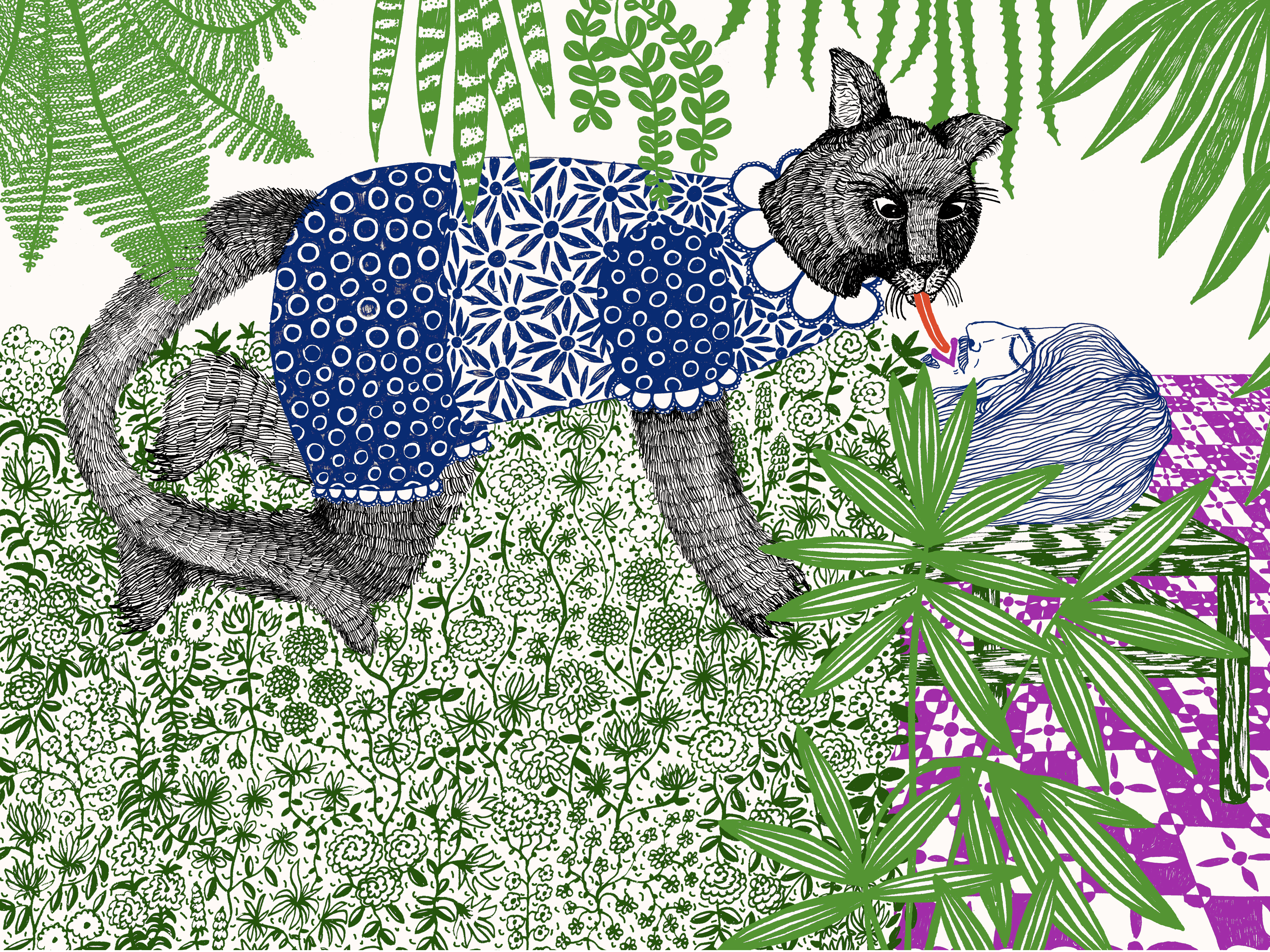 Grafika Kasi Walentynowicz przedstawiająca zmorę – postać z polskiej demonologii ludowej – w postaci kota duszącą człowieka. Grafika ilustruje tekst Oskara Kolberga opublikowany w tomach Wielkie Księstwo Poznańskie, Cz. 7, Krakowskie, cz. 3, Radomskie, Cz. 2